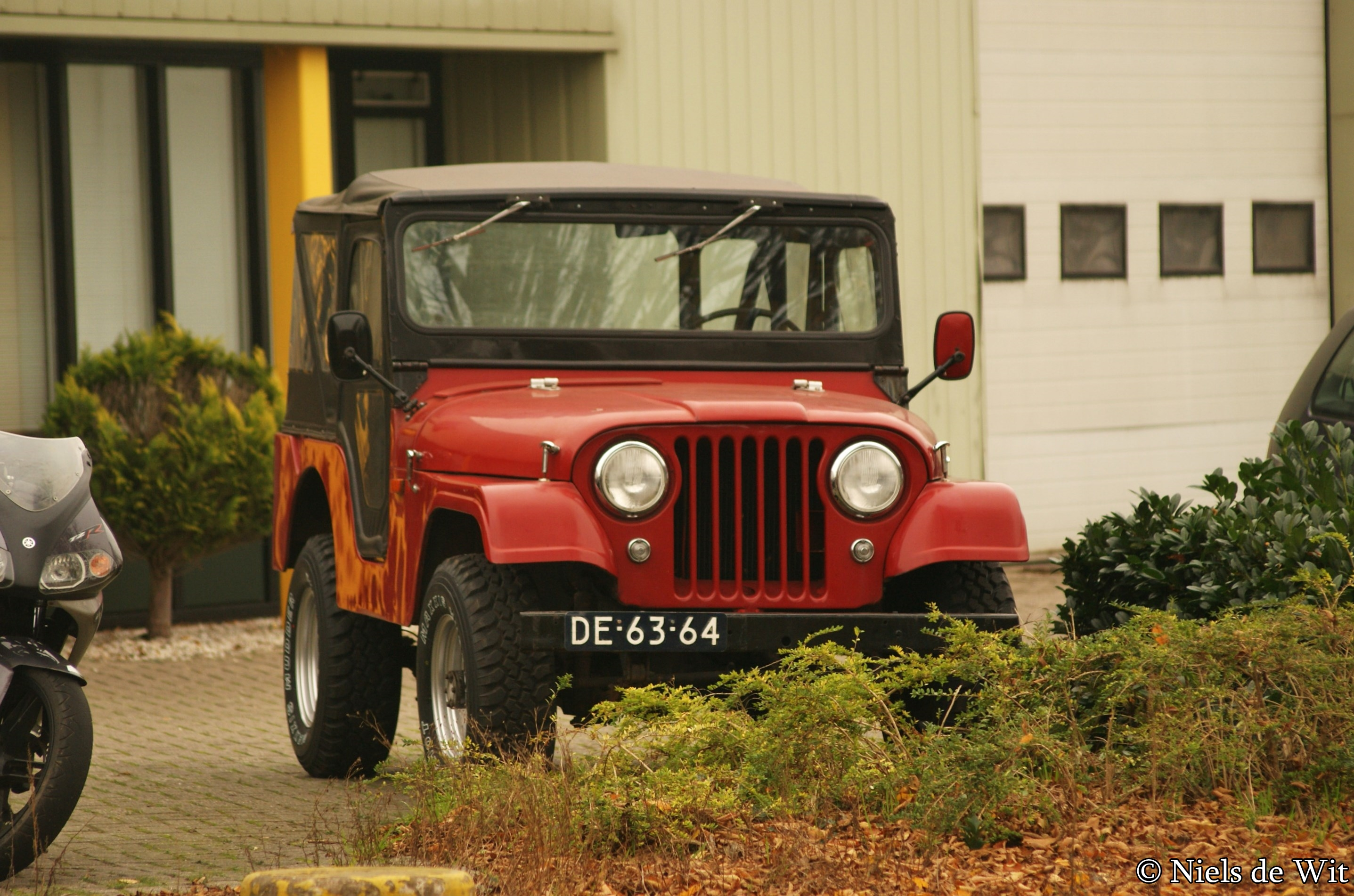 DE-63-64